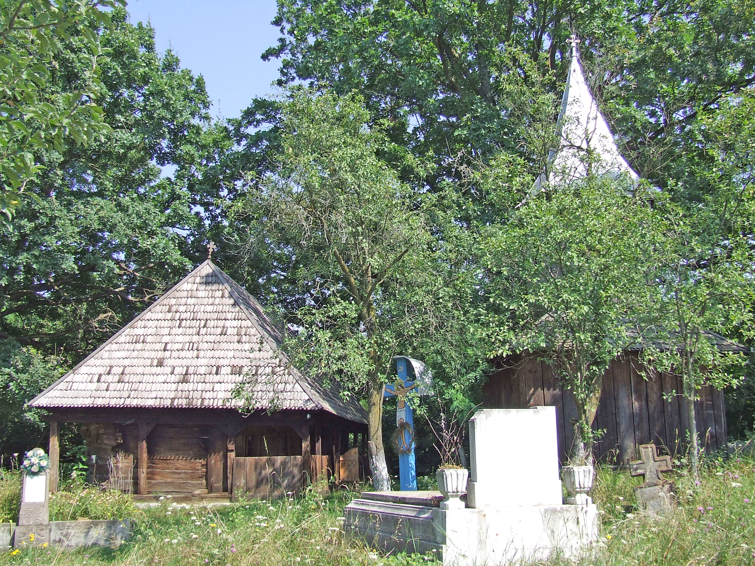 Biserica de lemn din Pădureni, judeţul Mureş.